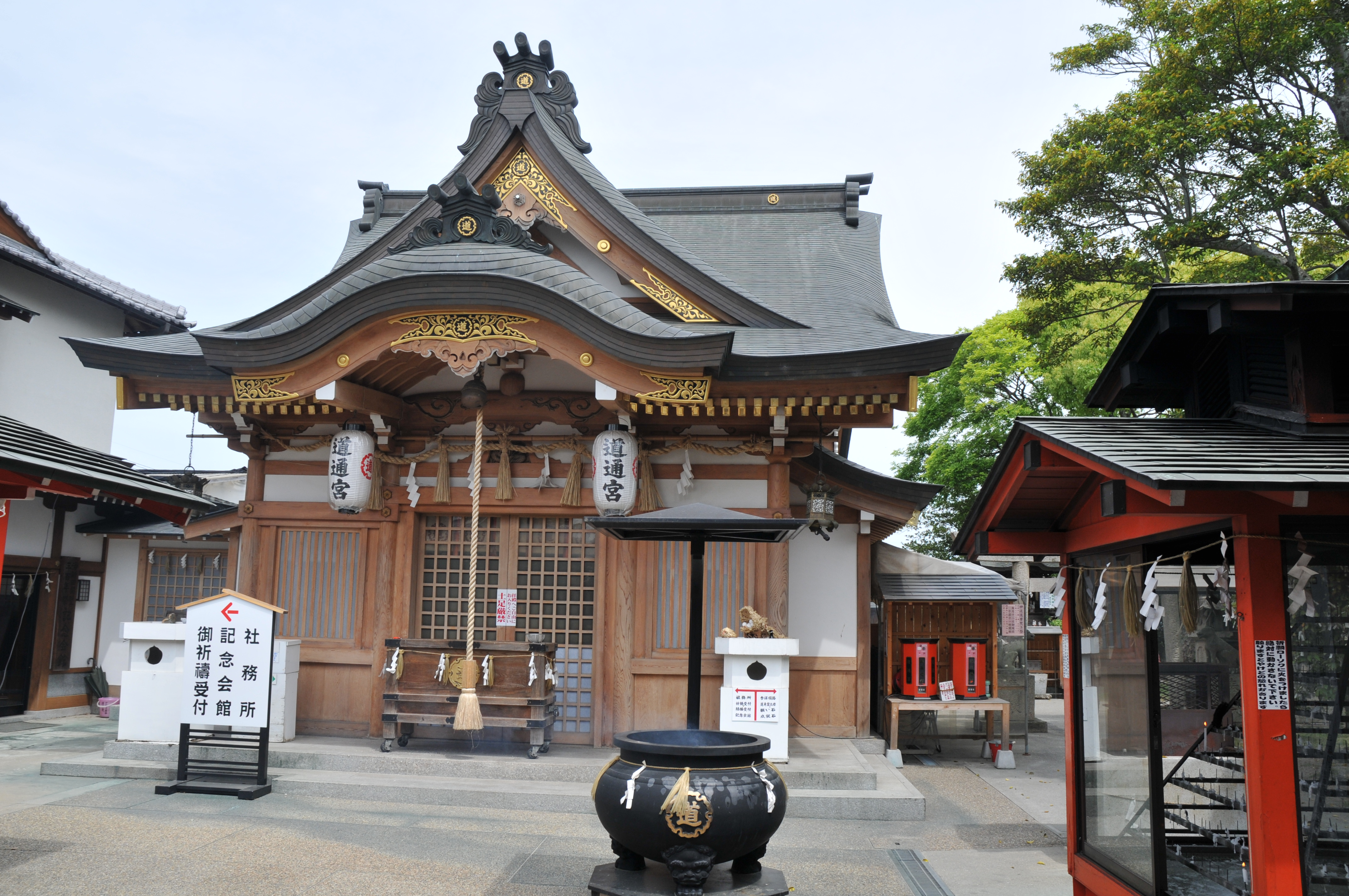 Dotsu-gu, a attached shrine of Okita-jinja